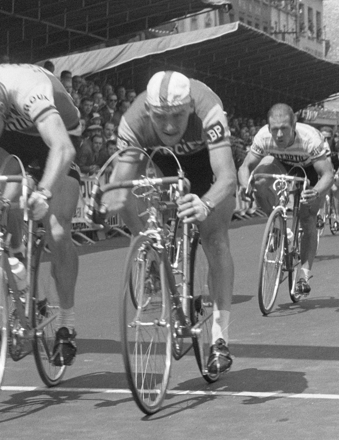 Tweede etappe Tour de France, halve etappe Spa-Herentals (finish Melckenbeeck)